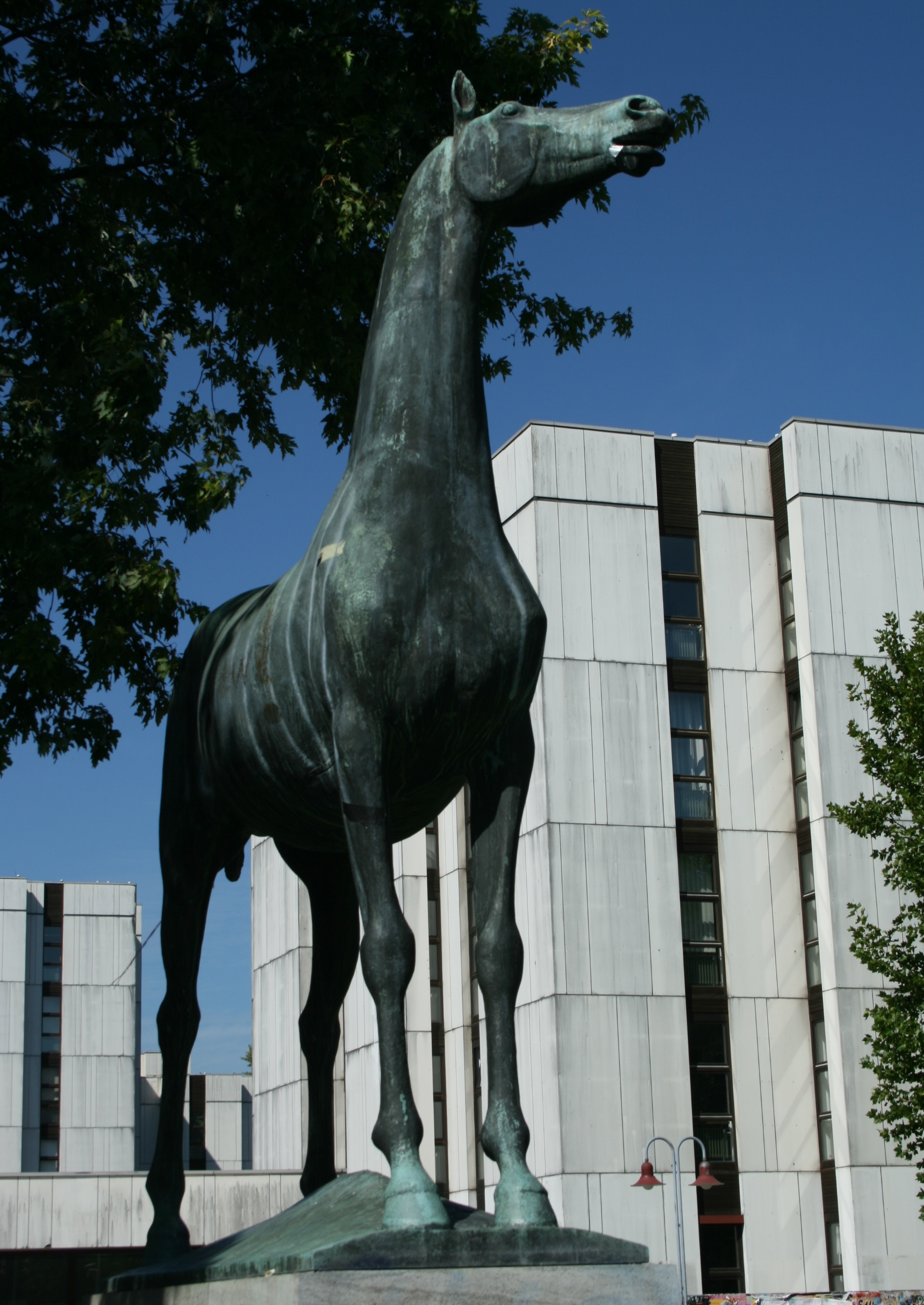 Gerhard Marcks' „Wiehernder Hengst“ (1961) vor dem „Philosophikum I“ der Justus-Liebig-Universität Gießen